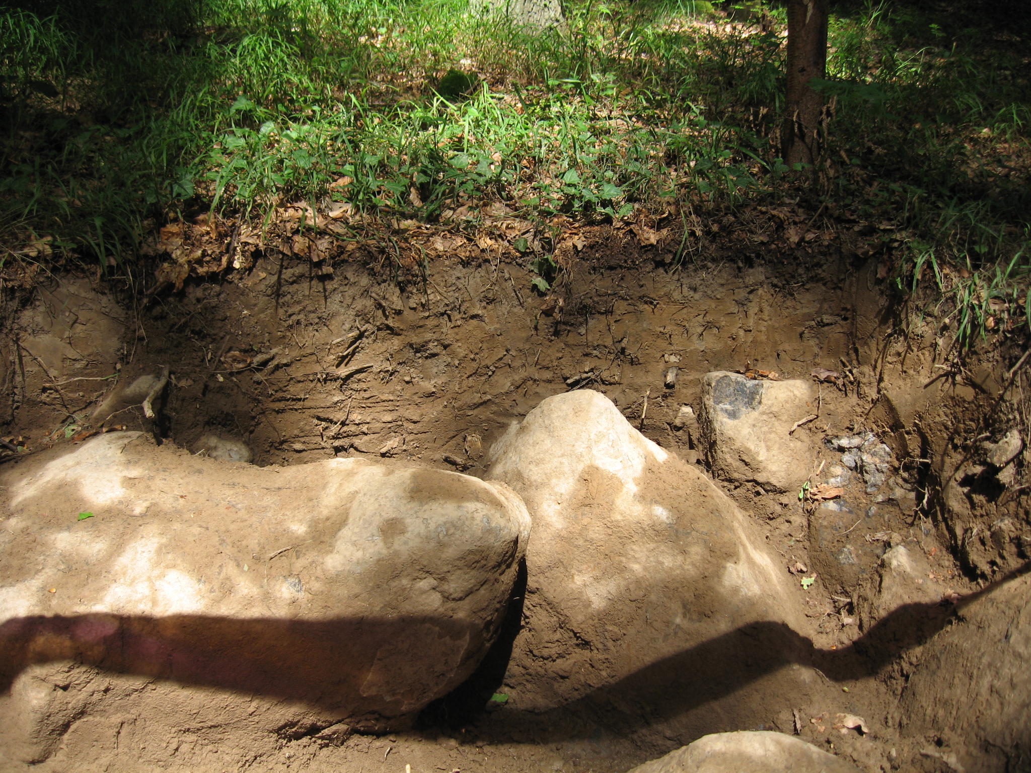 Bodenschnitt im Schiffenberger Wald bei Gießen (Braunerderanker)